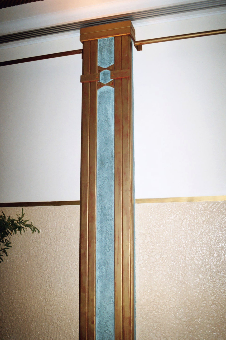 Belgique - Bruxelles - Complexe Albert Hall - Roseland